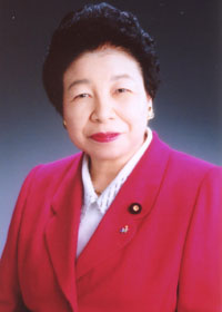 Minister Chieko Nōno.